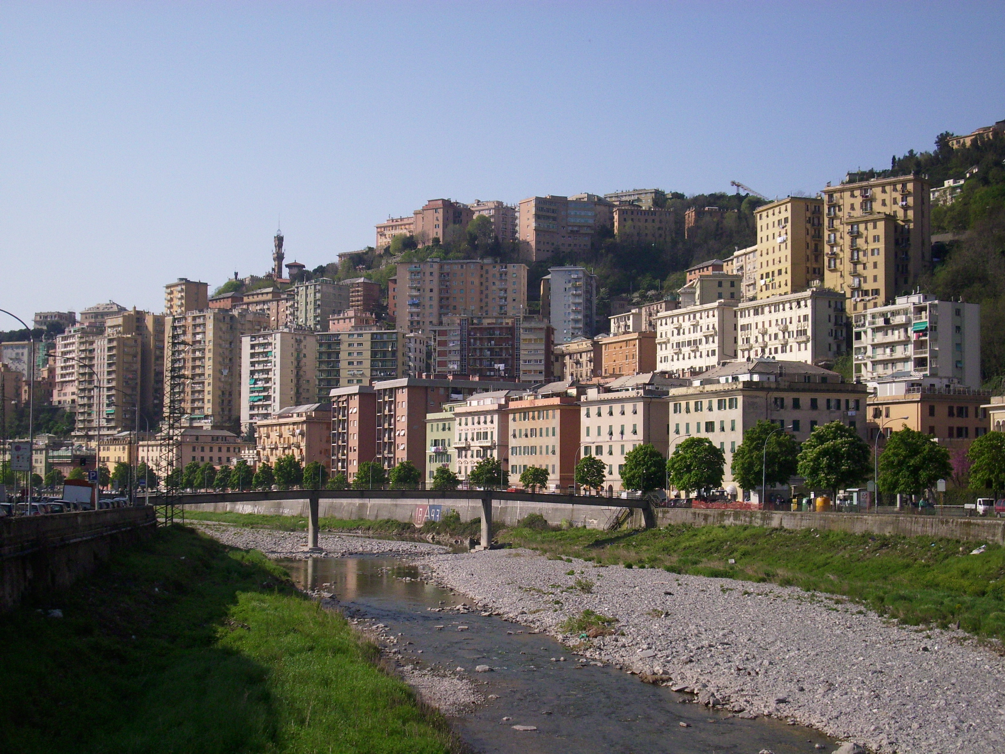 Il letto del torrente Bisagno nel quartiere di Marassi, direzione mare. Sul fondo tra i palazzi si nota la torre del Castello Mackenzie.